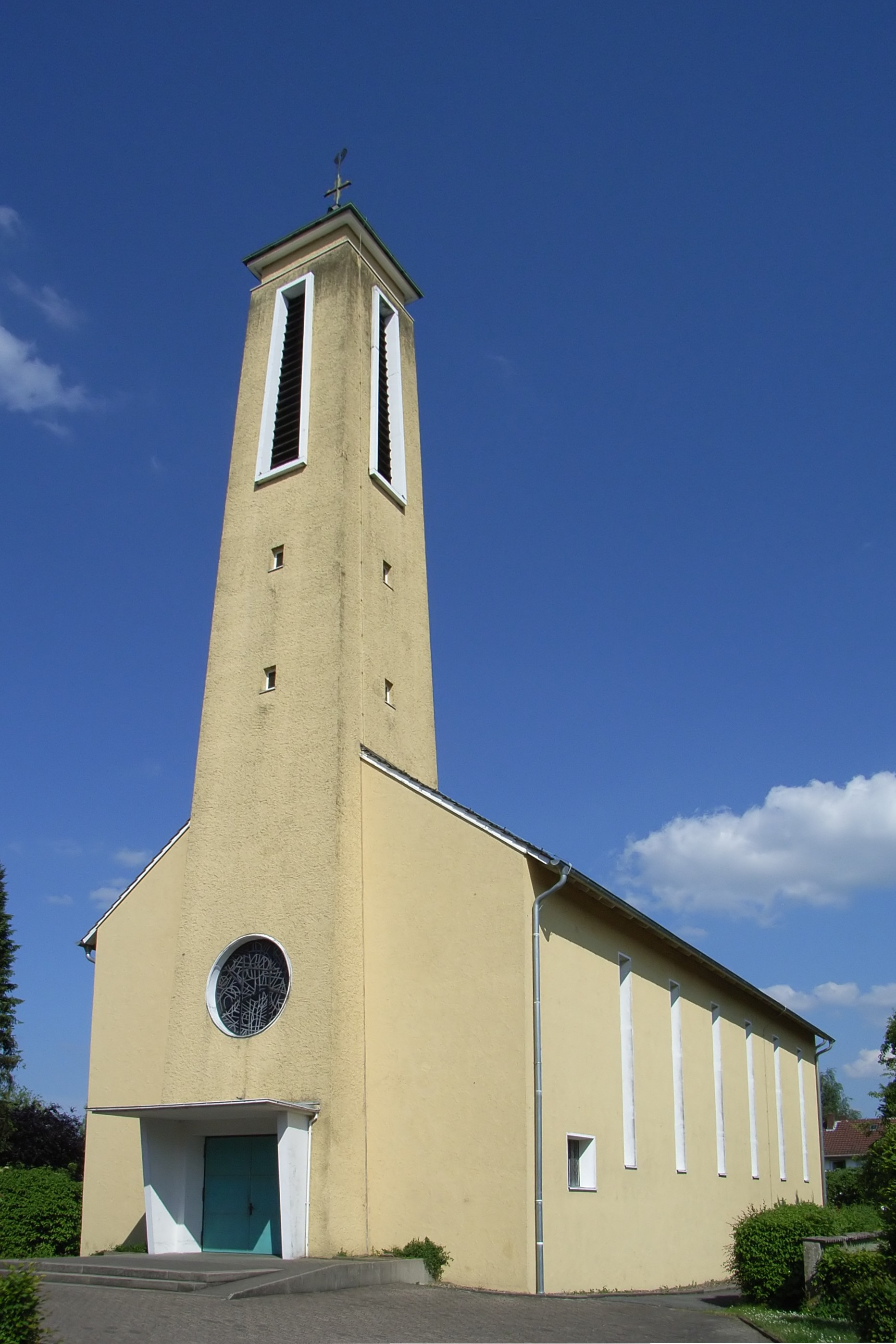 Bielefeld, Deutschland: Katholische Heilig-Kreuz-Kirche im Stadtteil Brake.